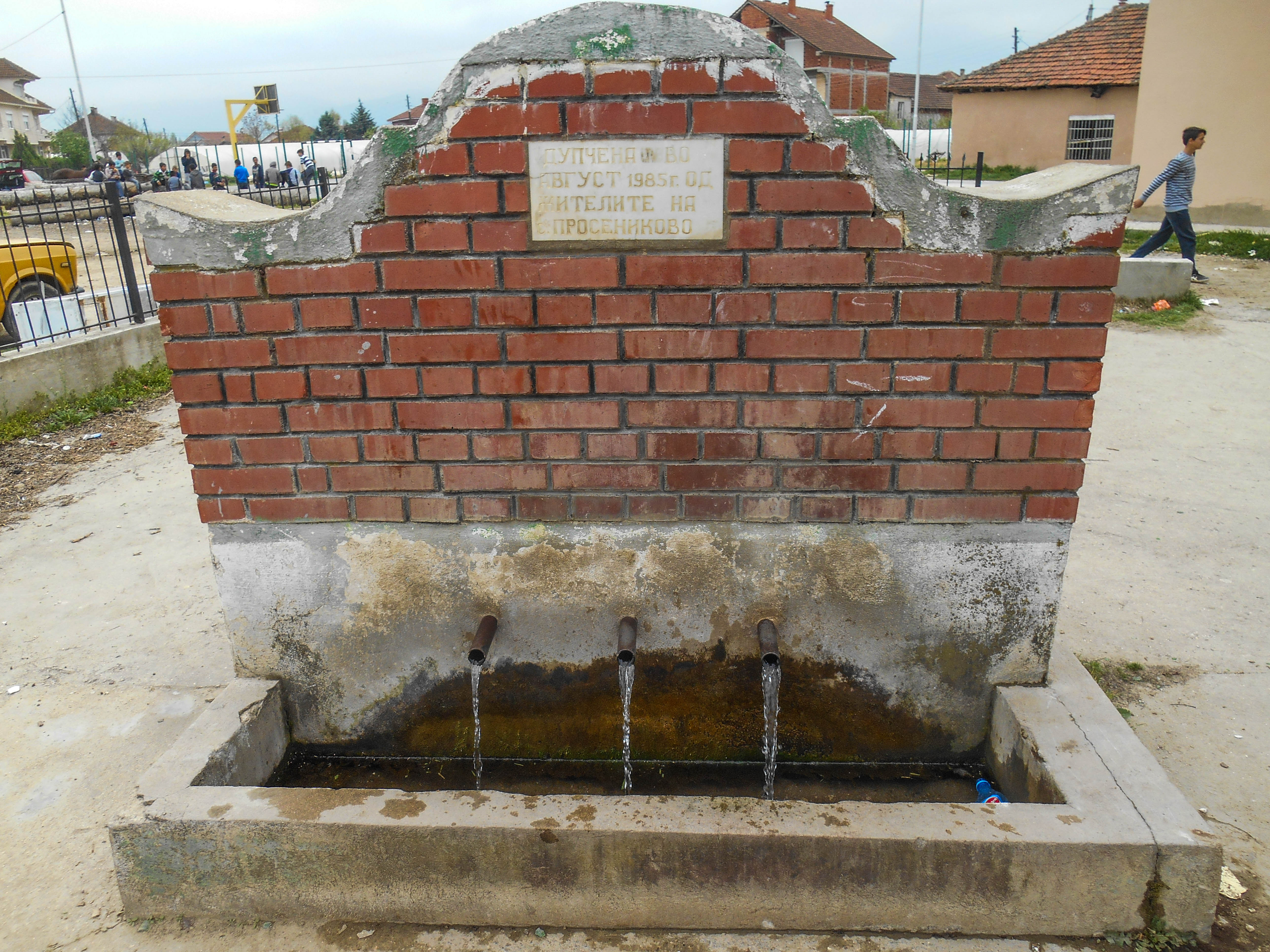 Селска чешма